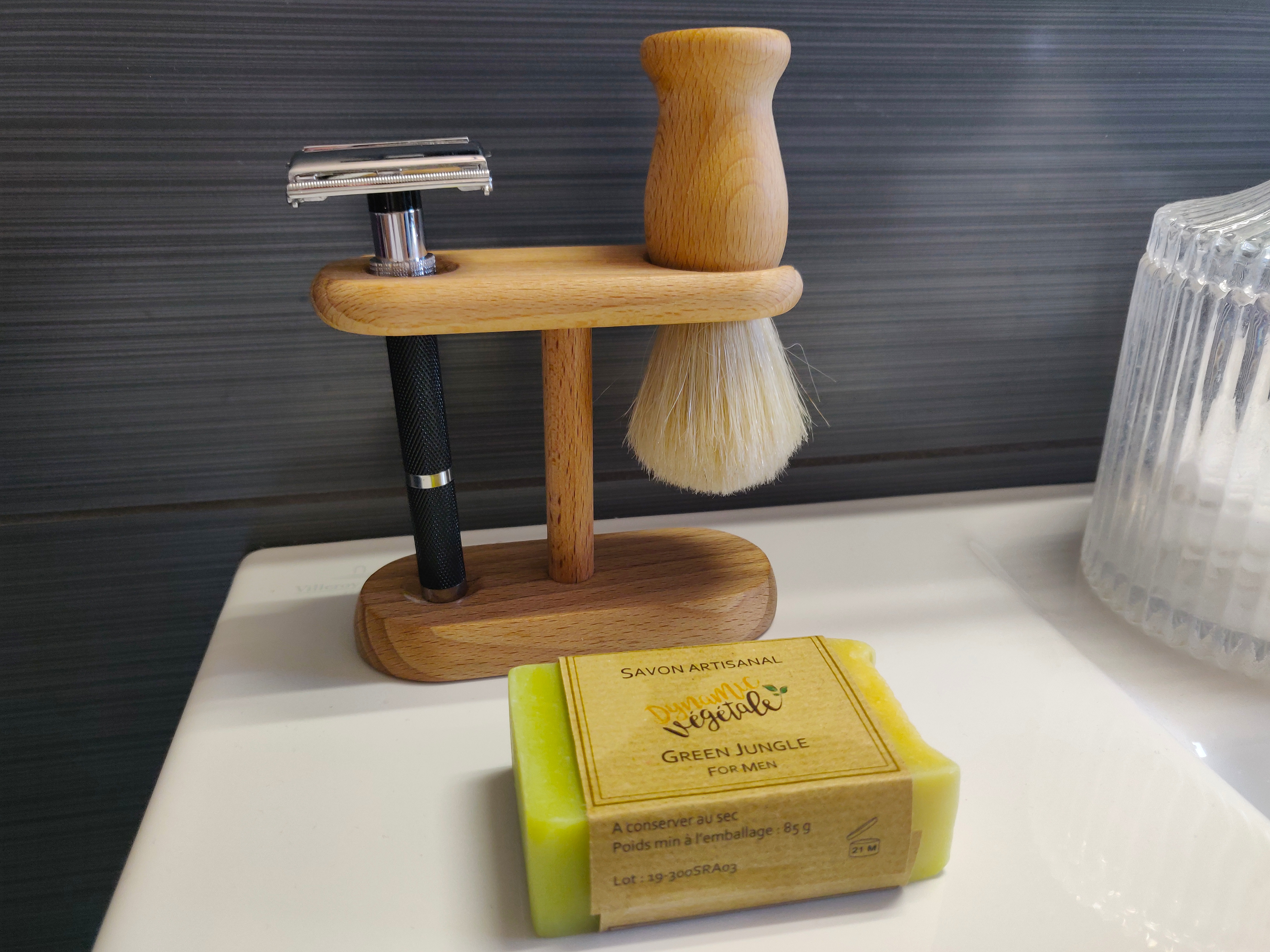 Kit de rasage traditionnelle